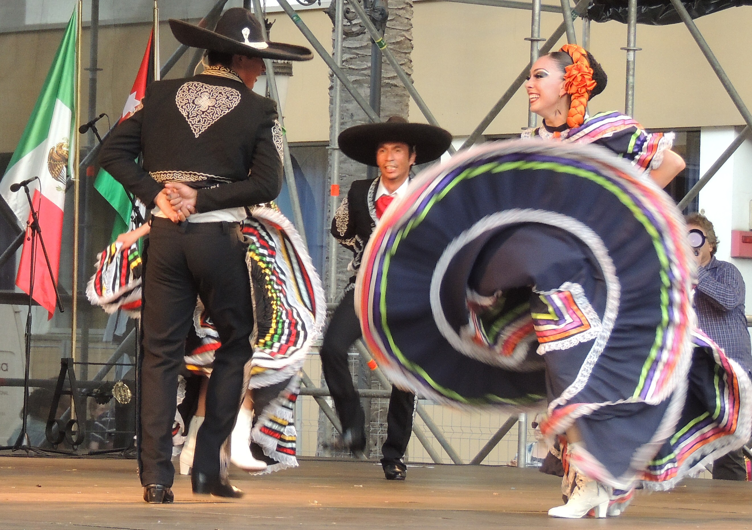 Festival Internacional de Folclore nos Cantons da Coruña (Ballet do estado de Hidalgo-Mexico)